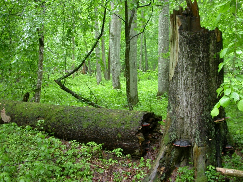 Auteur: Yapo, 04/06/2006